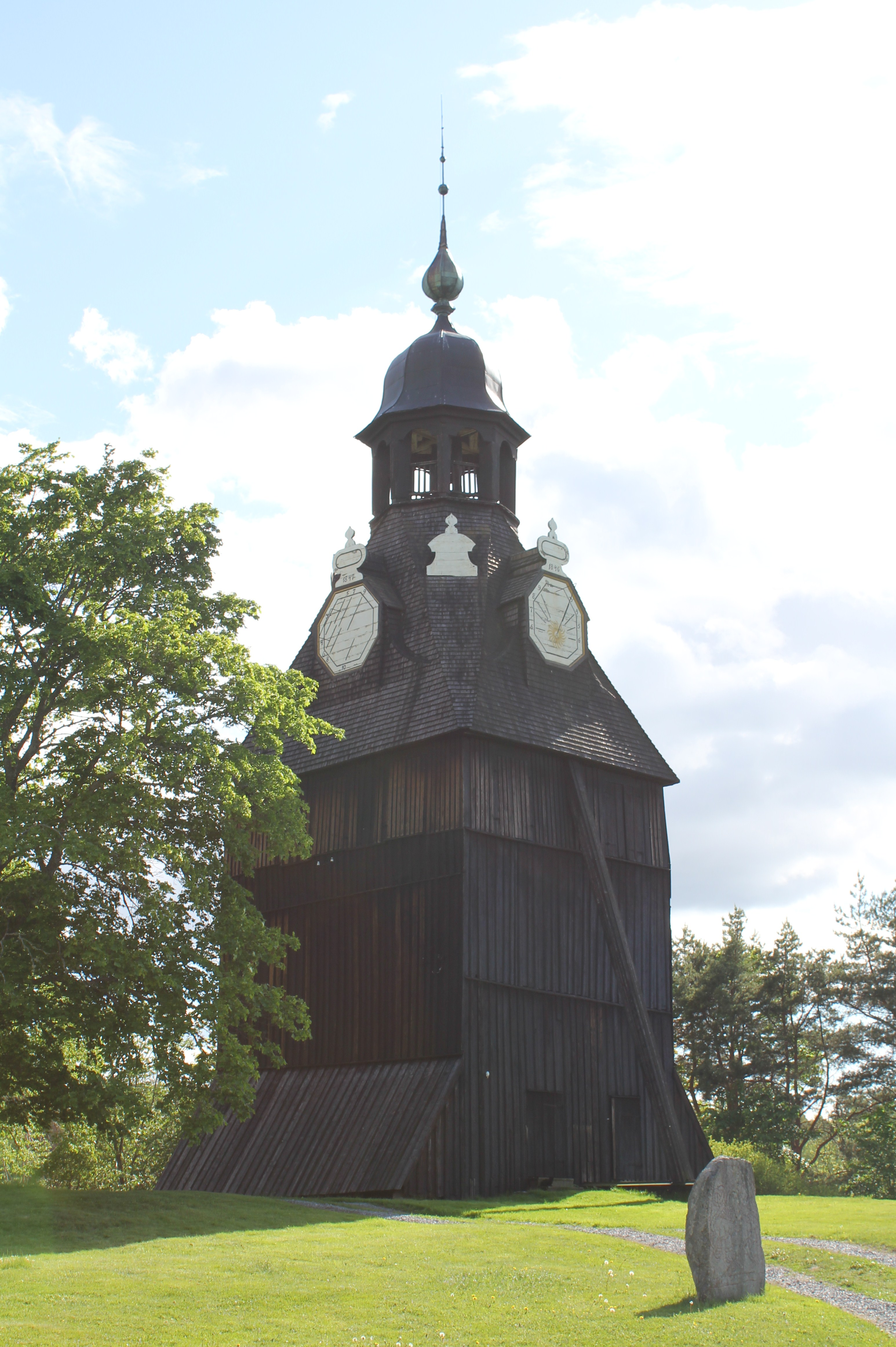 Klockstapel, Veckholms kyrka, Enköpings kommun.